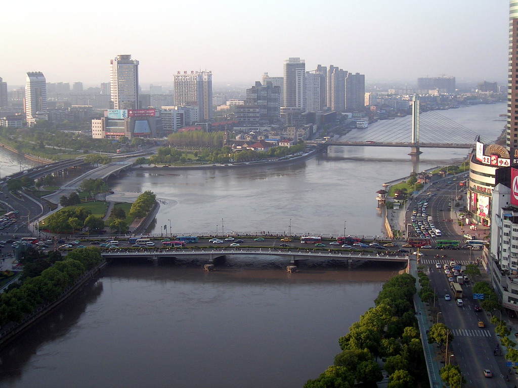 三江汇集 Ningbo, Zhejiang, China